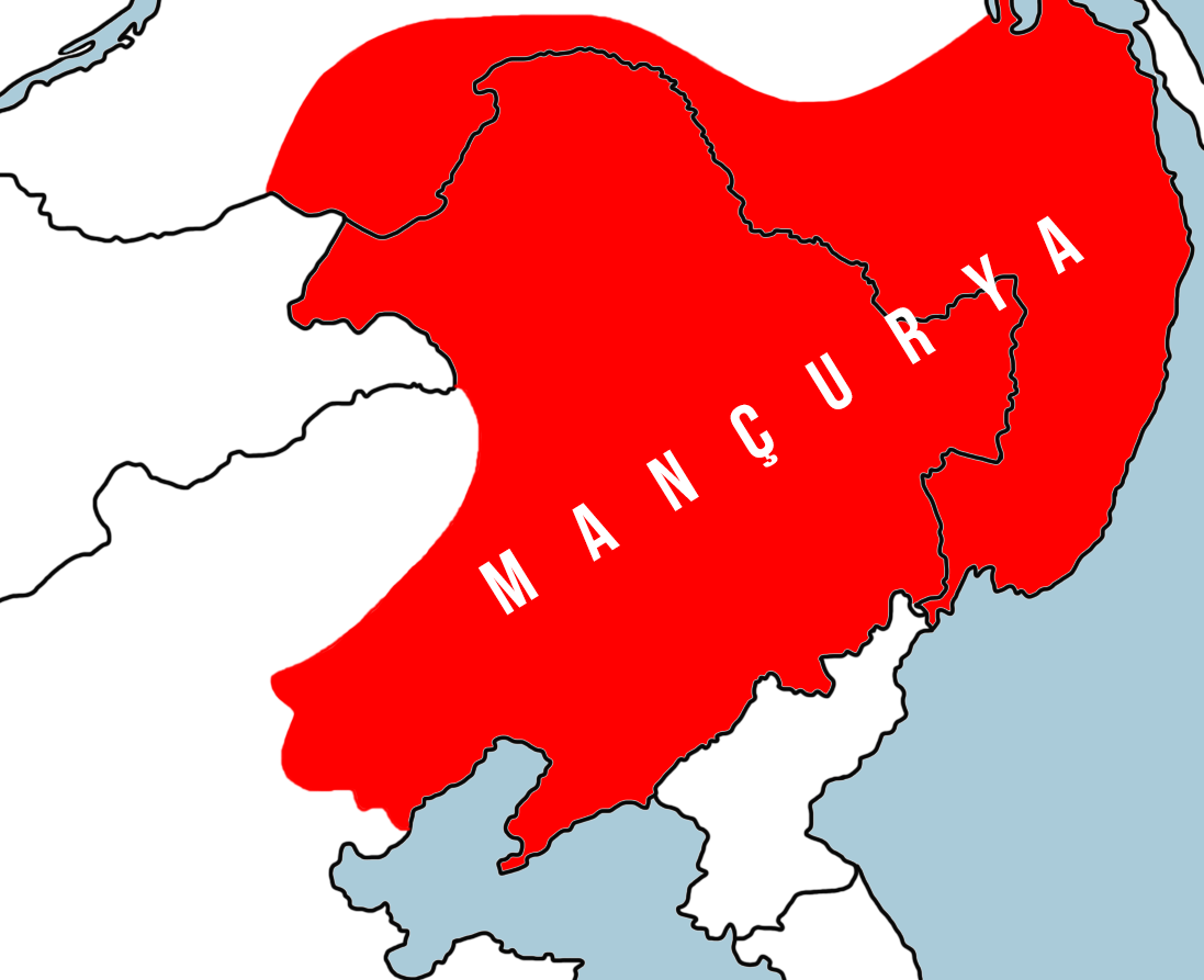 Mançurya